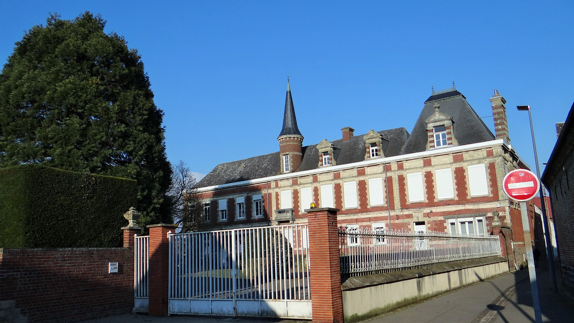 Maison à Viilers en Cauchies